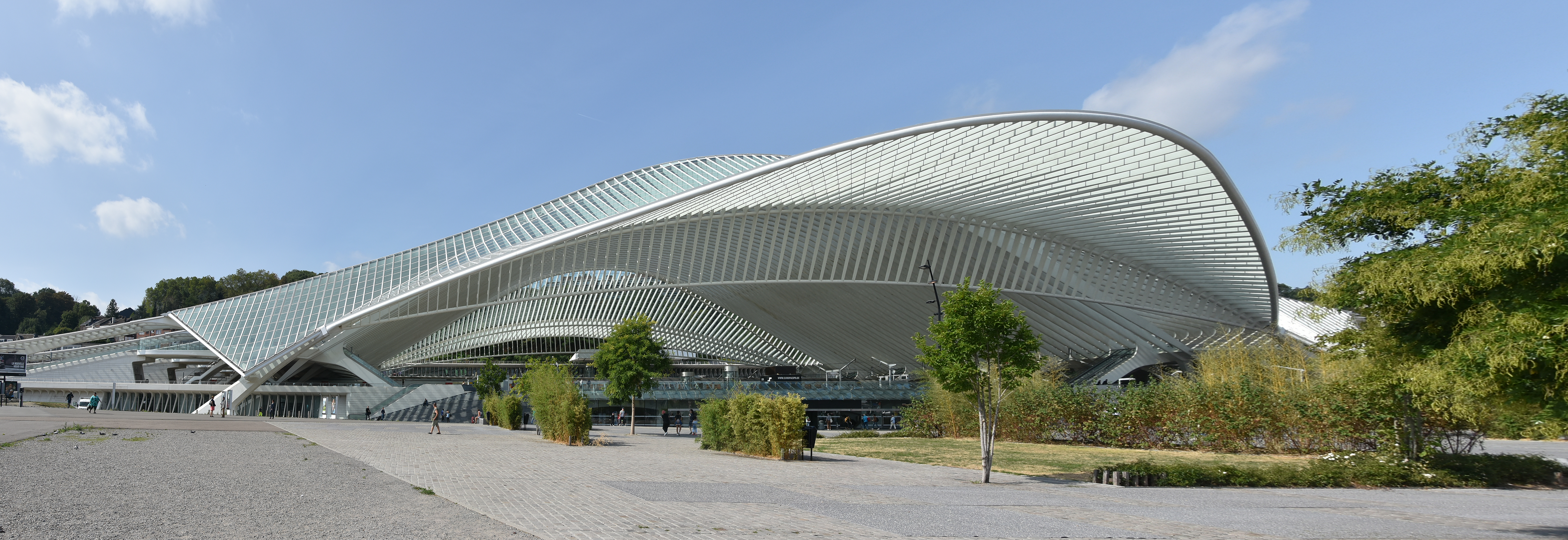 Station Luik-Guillemins 23-08-2018 11-36-01 This photo of immovable heritage has been taken in the Walloon Region